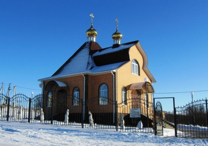 новопостроенный храм Вознесения Господня в селе Богатое.